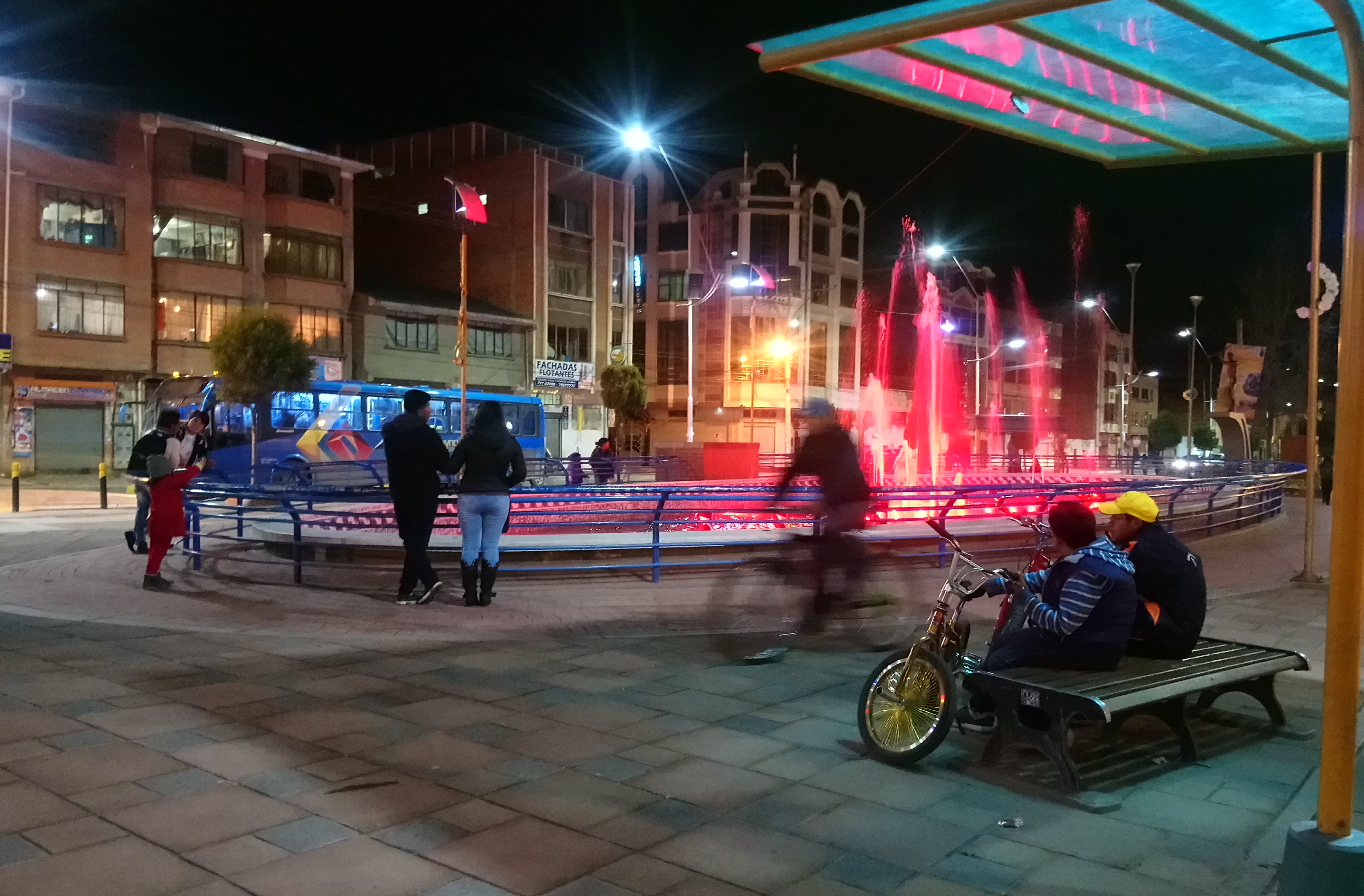 Vista nocturna de la avenida Cívica en El Alto